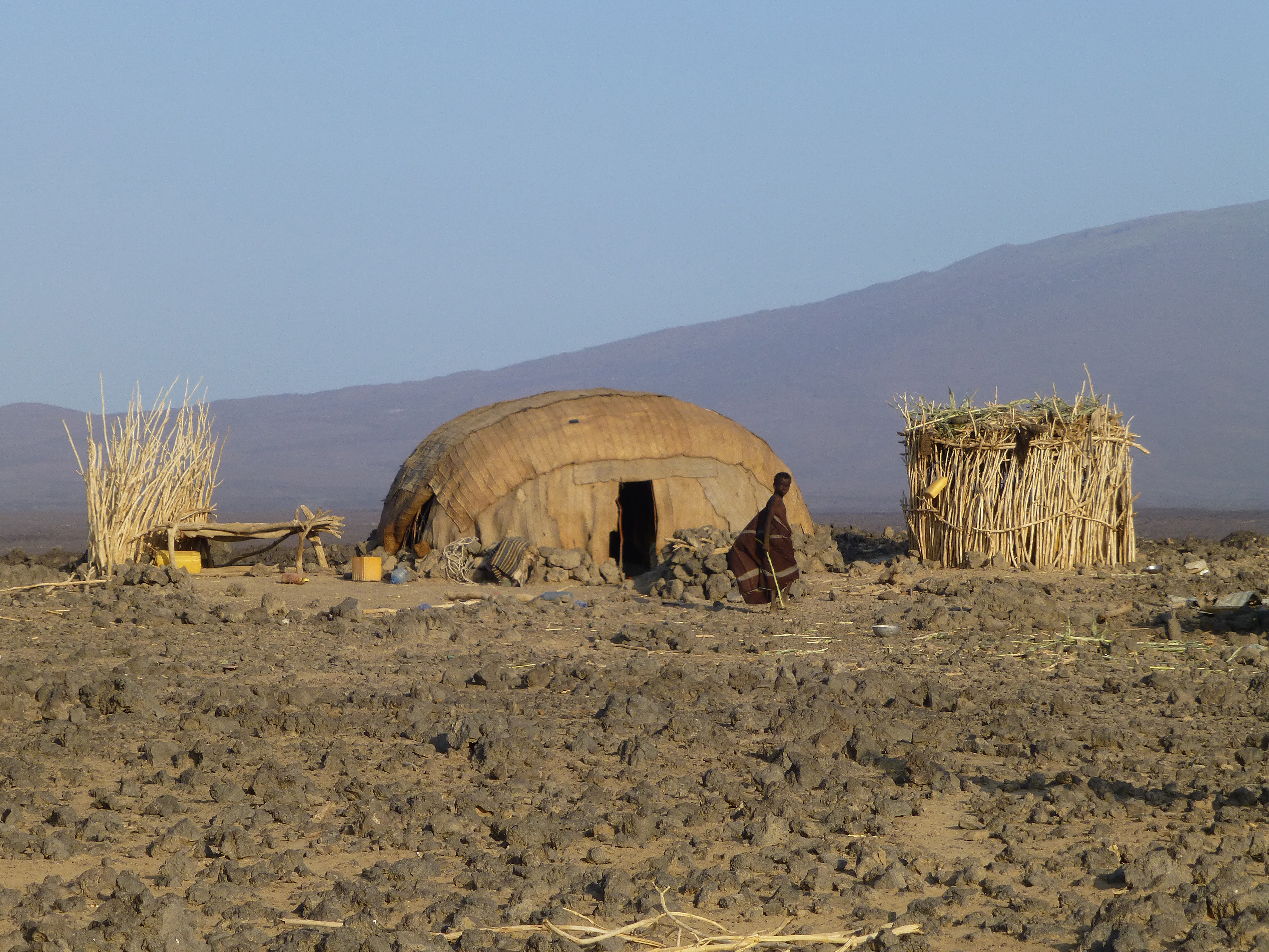 Une daboyta, tente traditionnelle Afar près de Dodom (Danakil, région Afar, Ethiopie)